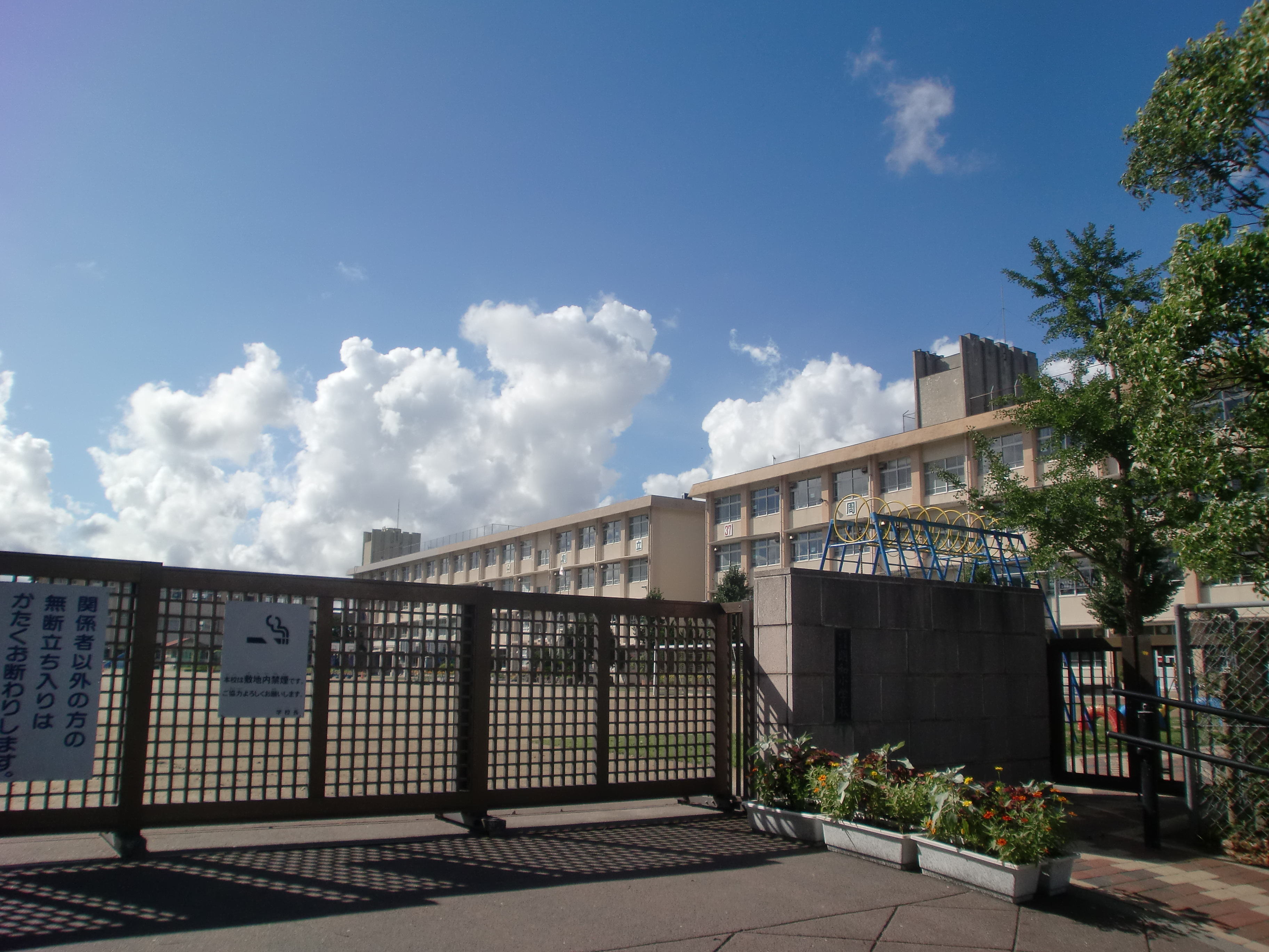 鹿児島市立明和小学校の外観。